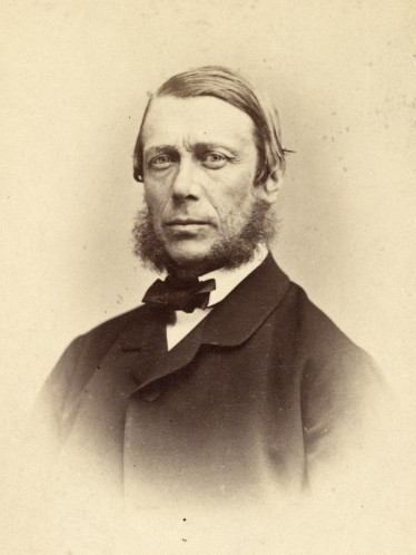 Edmund Hartig (1812-1883)